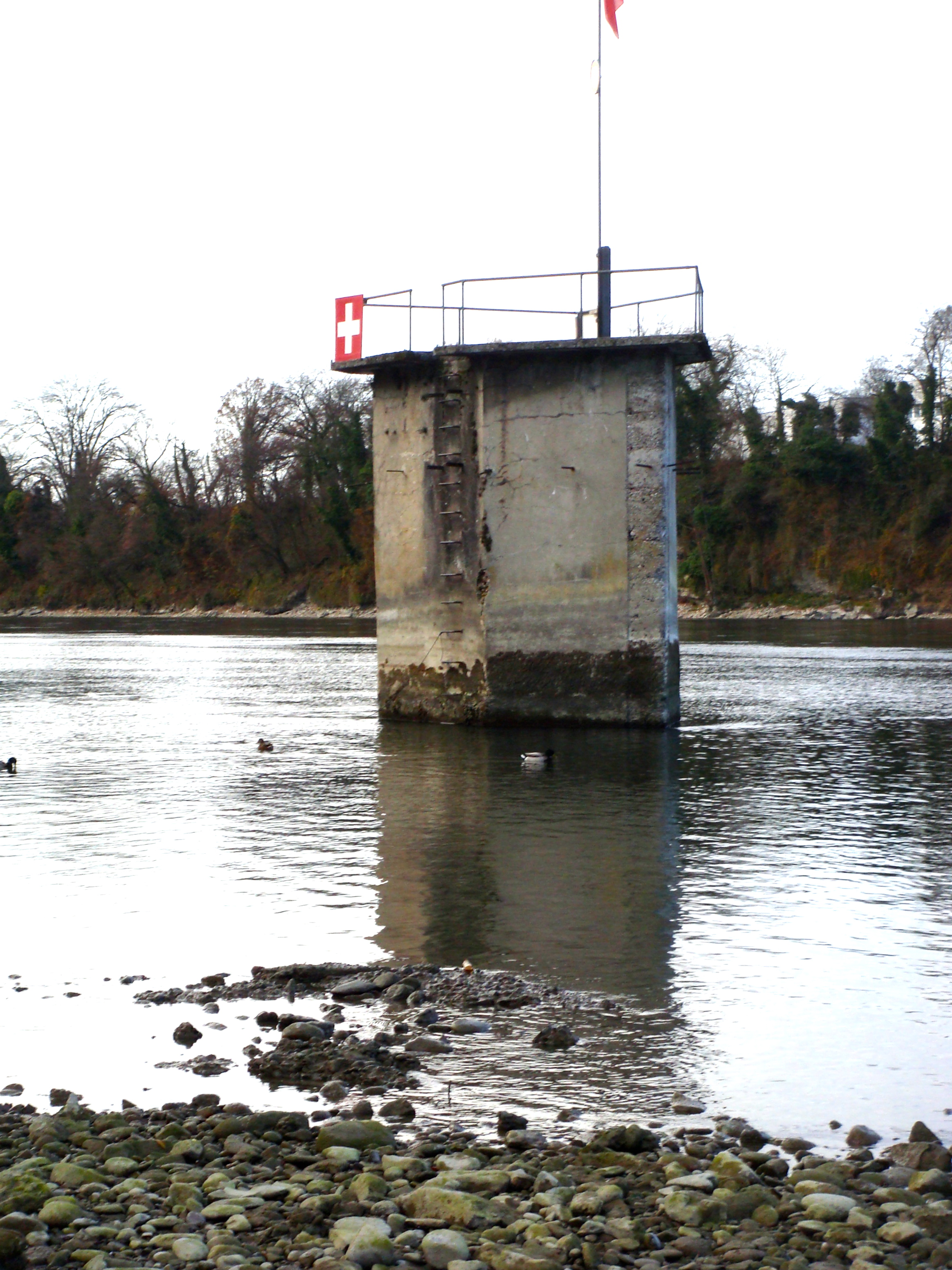 Das heutige "Türmli" in Mumpf, aufgenommen 2015 bei Tiefwasser.